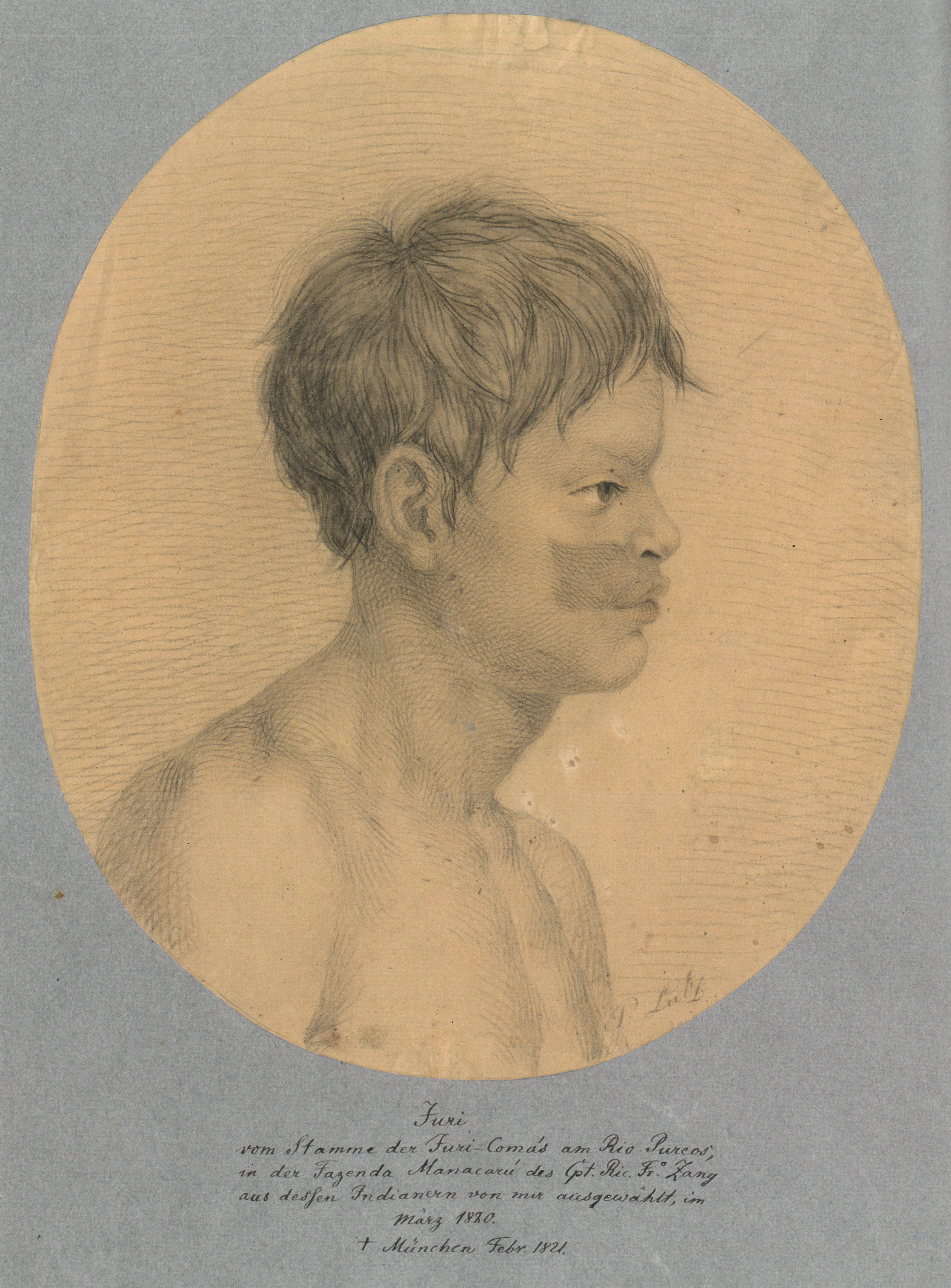 Johannes aus dem Volk Juri aus Brasilien. Er wurde 1820 von Spix und Martius von Brasilien nach München (Deutschland) mitgebracht. Er starb am 11. Juni 1821 in München und wurde hier begraben.